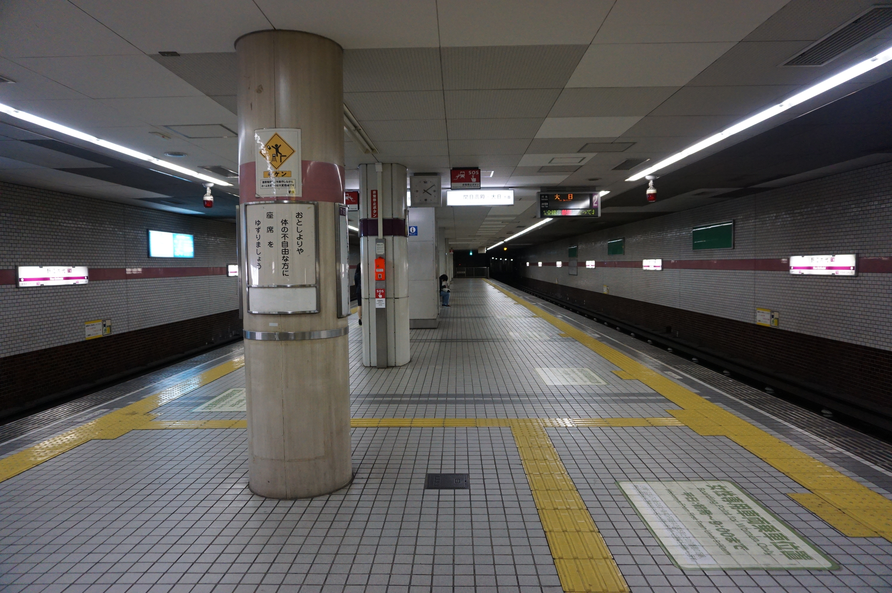 ホーム（2018年4月）